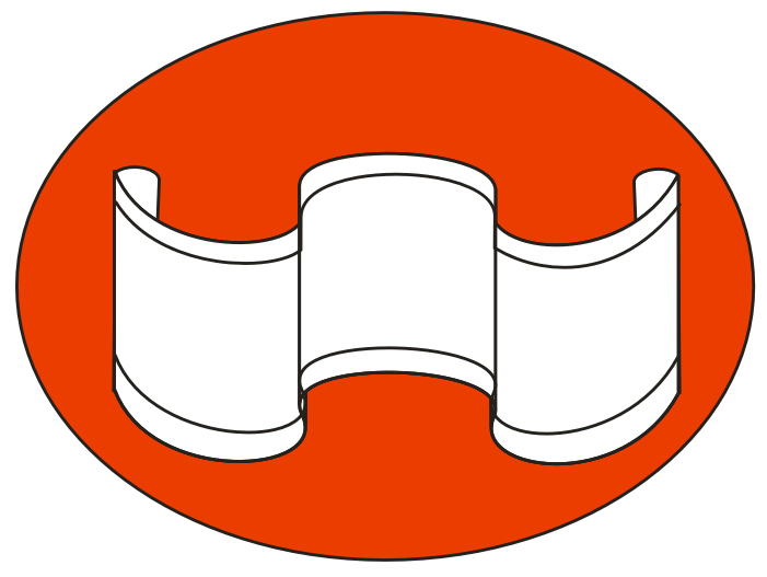 國立臺南藝術大學校徽